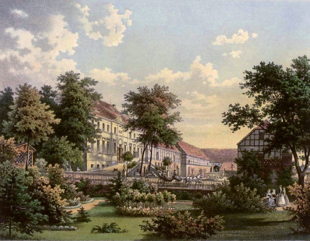 Schloss Grieben, Kreis Stendal